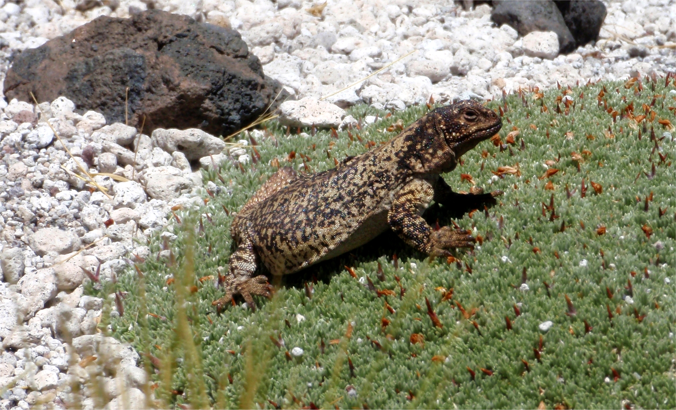 Un ejemplar de Lagarto Cola Pinche Puneño (Phymaturus Antofagastensis) que tomaba sol sobre una mata de Yareta(Mulinum Albovaginatum), posiblemente endémico en la Puna Catamarqueña e identificado por Enrique A. Pereyra recién en 1985. Foto tomada con una pequeña camara Olympus, pero que puede tener valor documental ya que es una especie poco fotografiada. Lugar de la toma: S 26°56,337’ W 68° 9,970’, Vega de San Francisco, Prov. de Catamarca, R. Argentina. Fecha: 04/02/2009